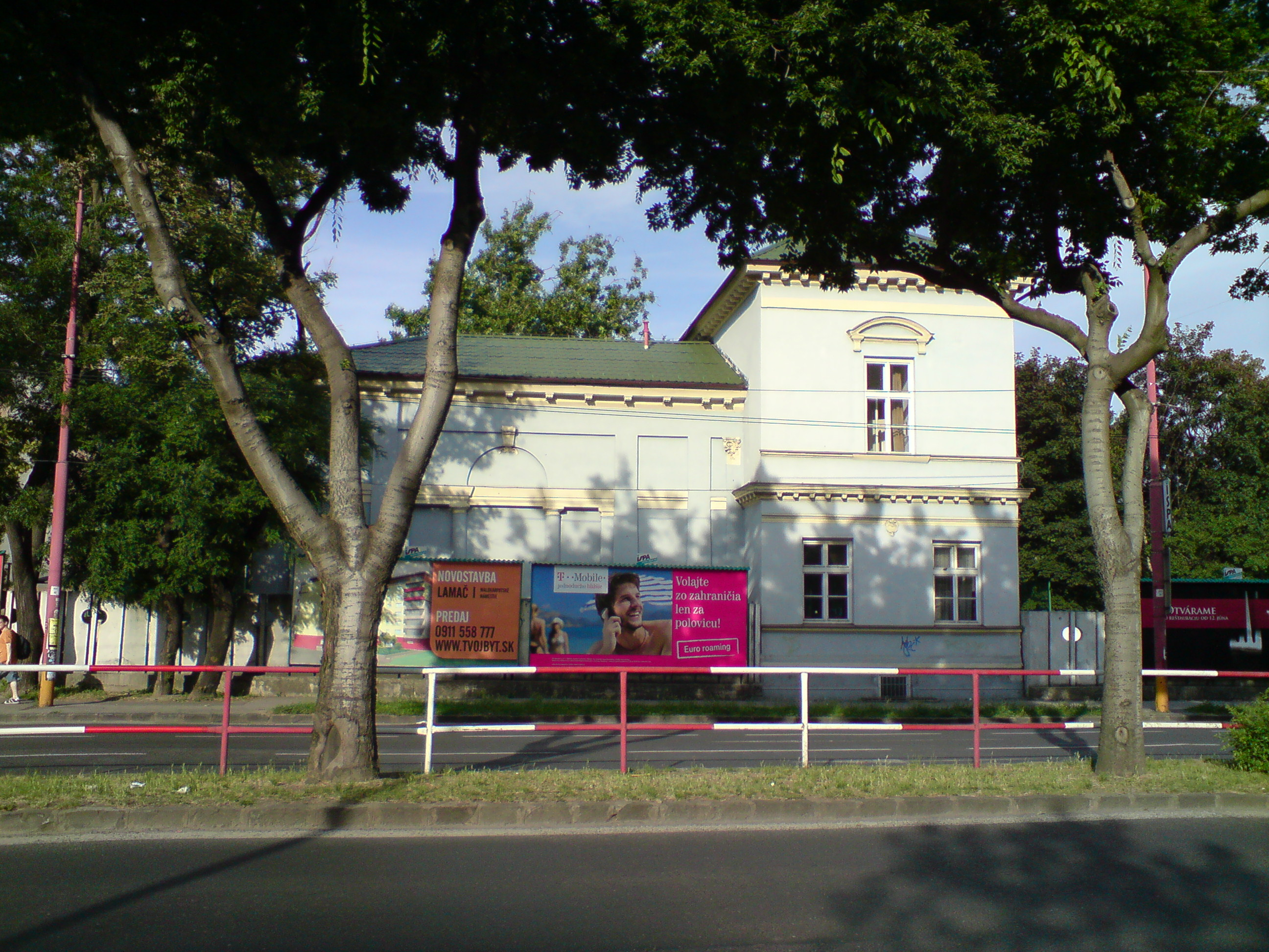 Ludwigov palác